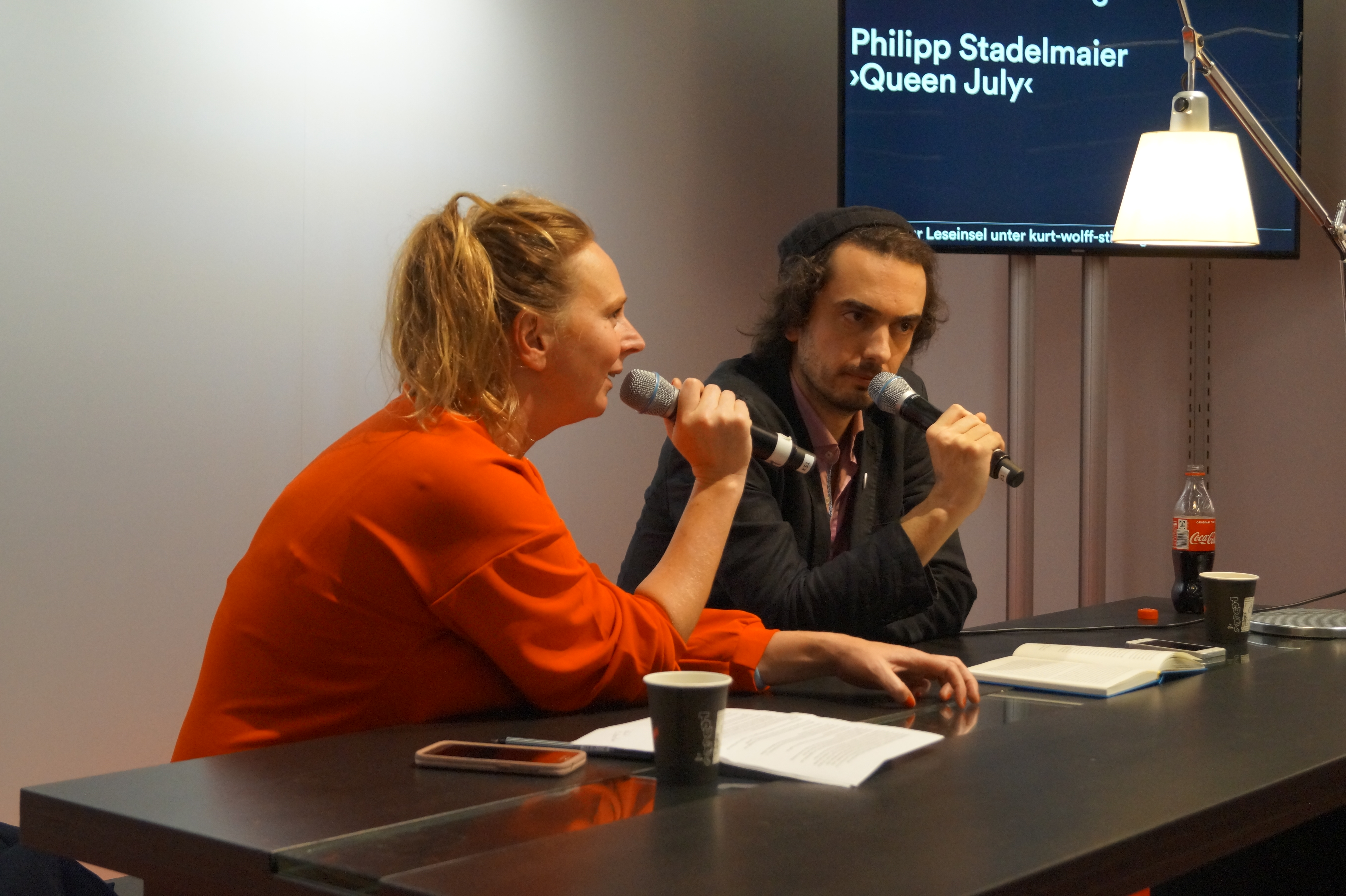 Frankfurter Buchmesse 2019 Personality rights warningAlthough this work is freely licensed or in the public domain, the person(s) shown may have rights that legally restrict certain re-uses unless those depicted consent to such uses. In these cases, a model release or other evidence of consent could protect you from infringement claims.